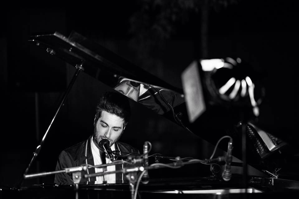 Antonio Maggio in tour 2015.